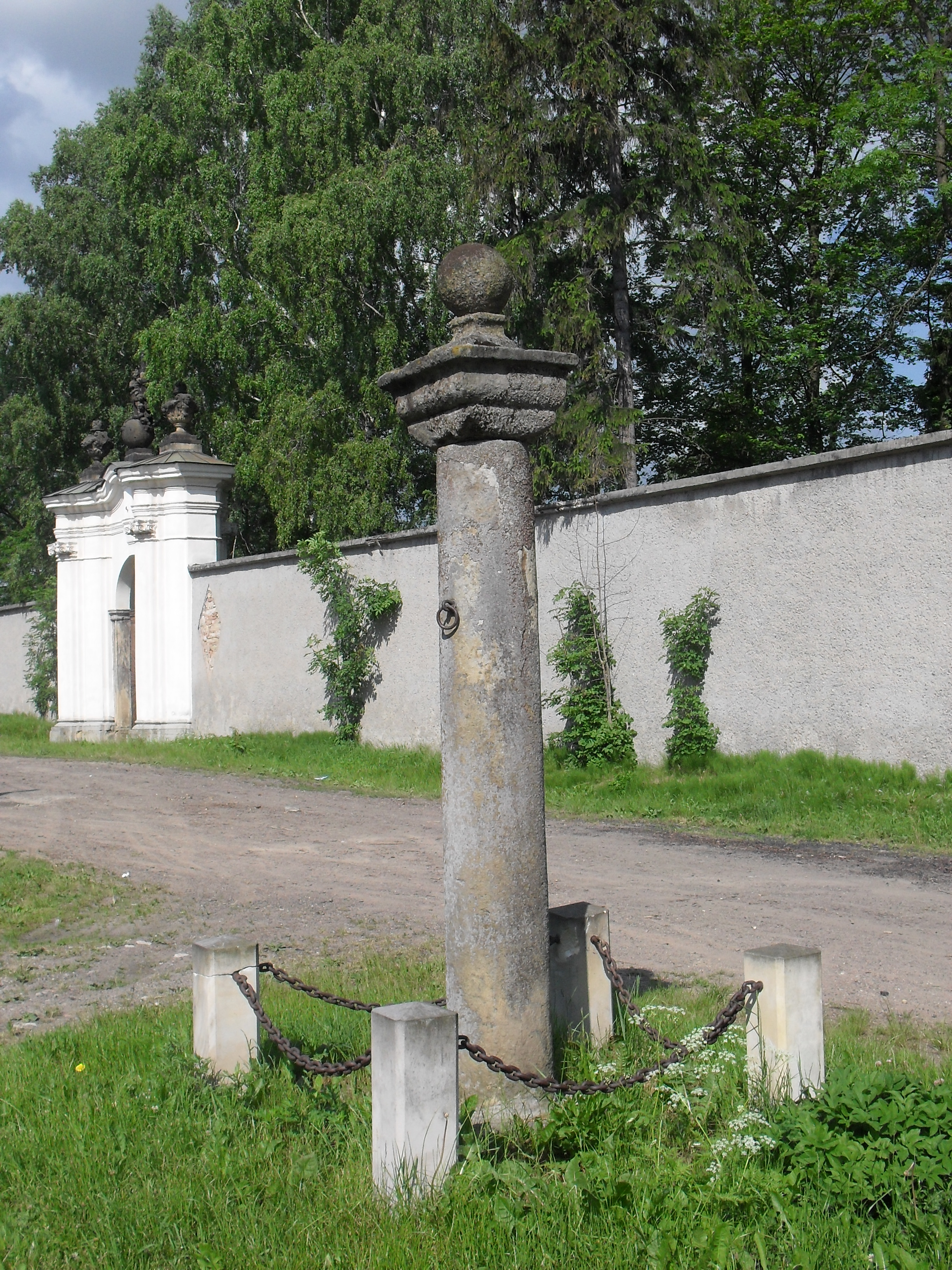 Krzeszów, pręgierz